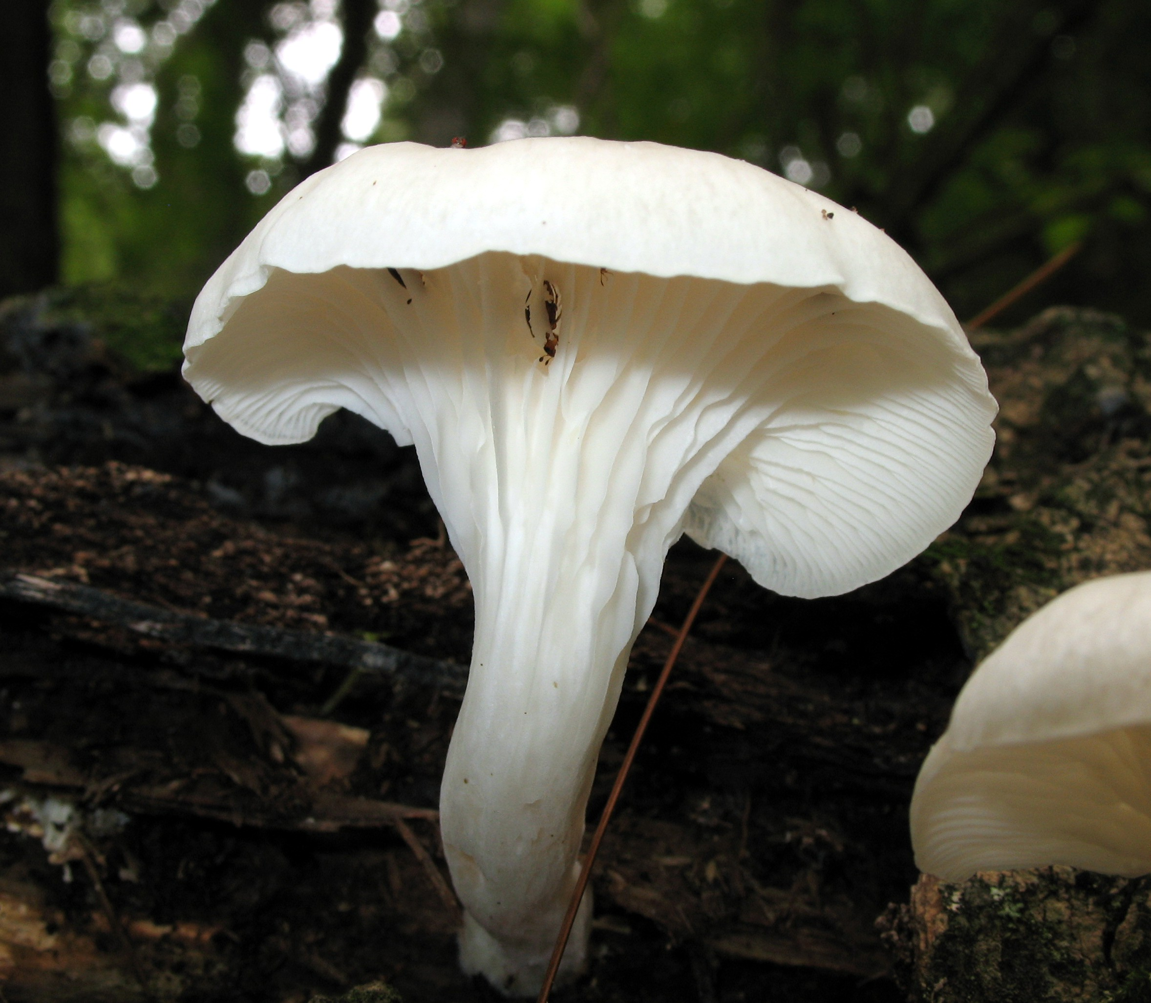 Pleurotus pulmonarius (Jacq.) P. Kumm.